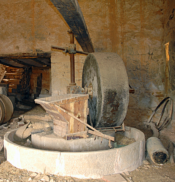 Premsa mecànica i per trencar olives, al molí del Bep de Canut de Torrebesses.